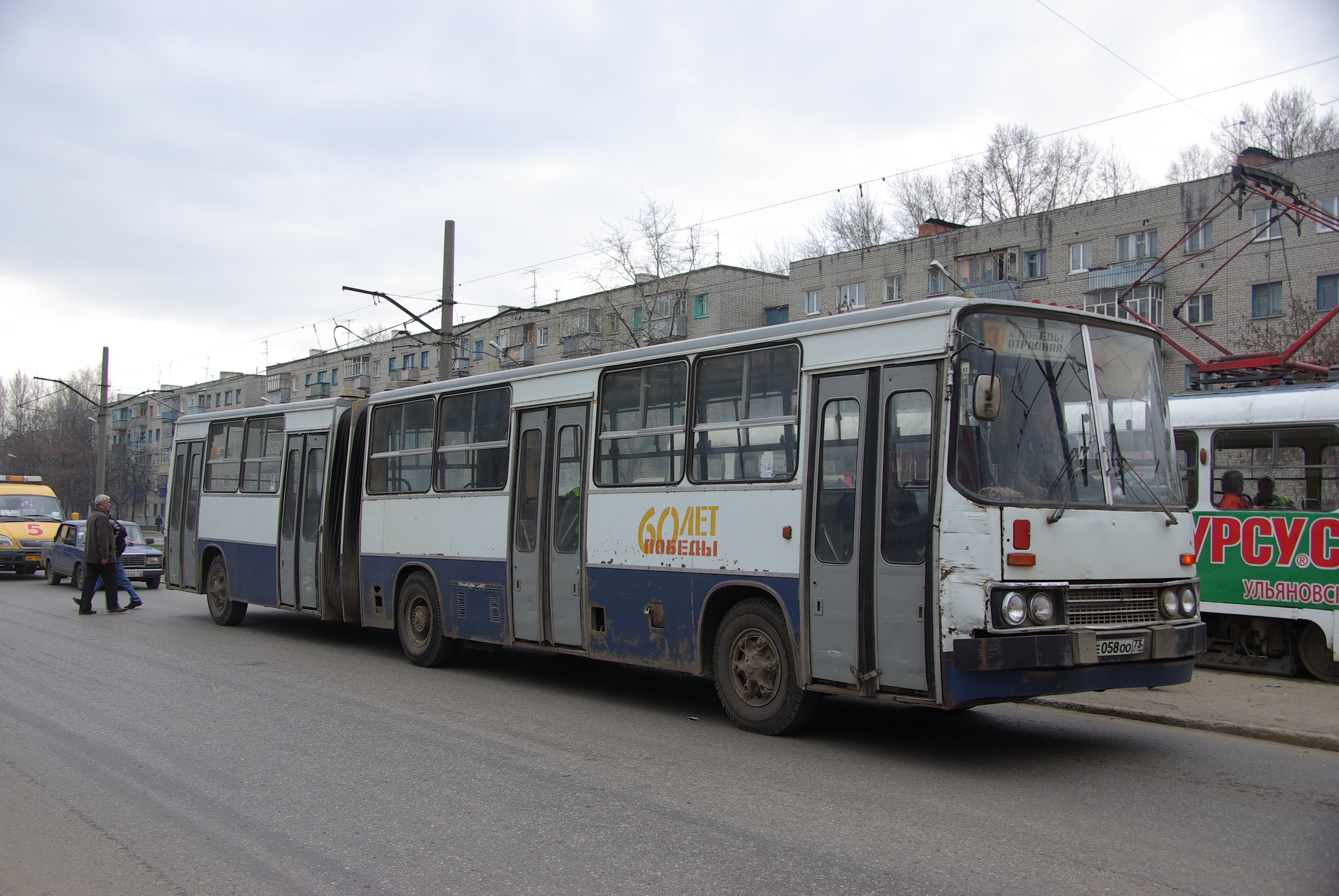 Автобус Ikarus 280 в Ульяновске на 3 маршруте. Идёт по проспекту Нариманова.